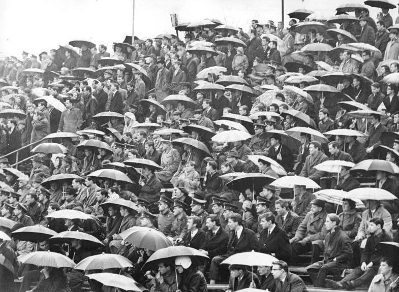 Zentralbild-Studré Ma-At. 12.4.1965 Berlin: Fußball-Oberliga - Der ASK Vorwärts Berlin besiegte den SC Leipzig am 11.4.1965 im Jahn-Sportpark mit 2:1 Toren. Rund 6.000 Zuschauer verfolgten trotz Regen das Spitzenspiel der Fußball-Oberliga.